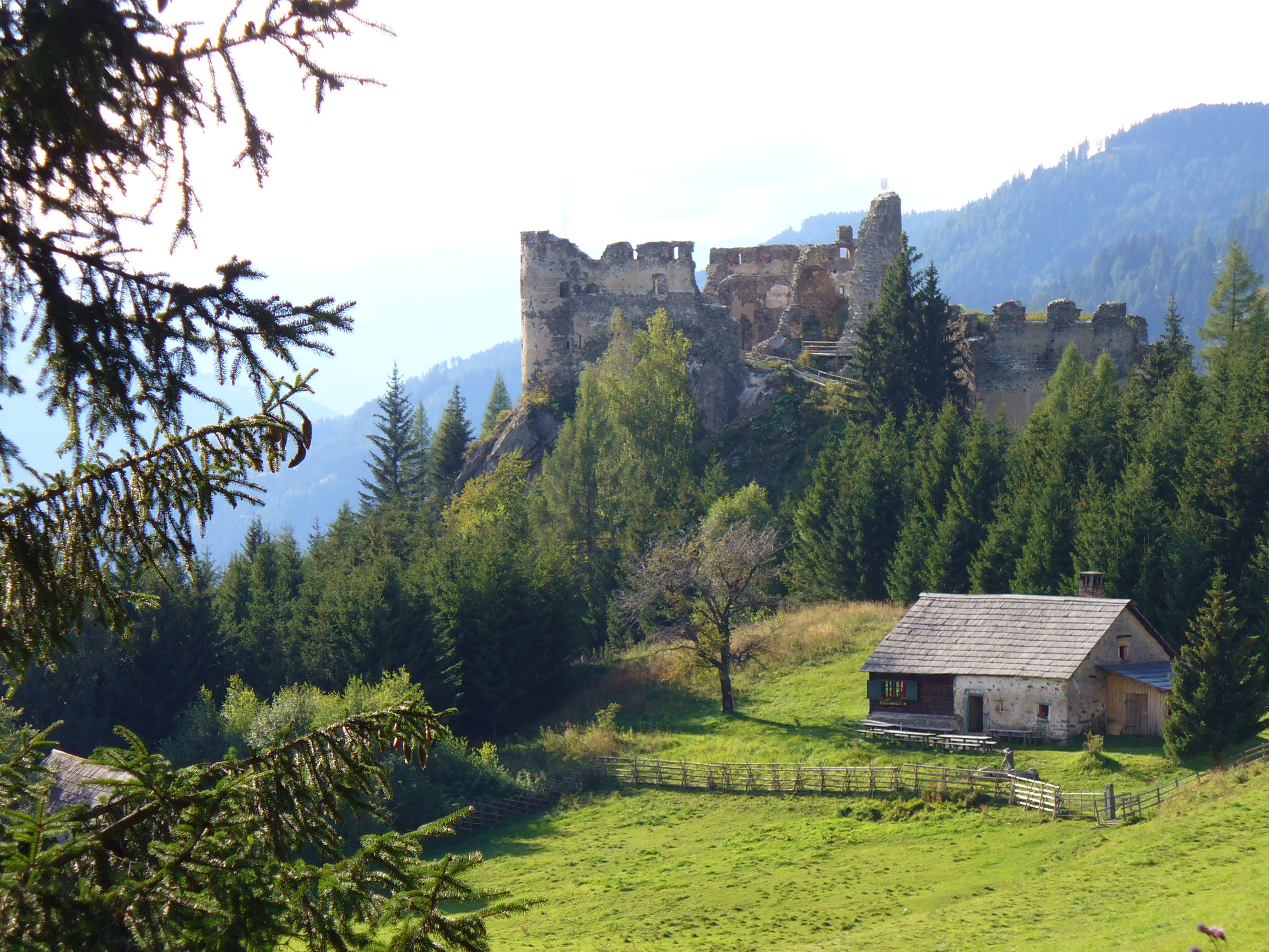 Burgruine Steinschloss